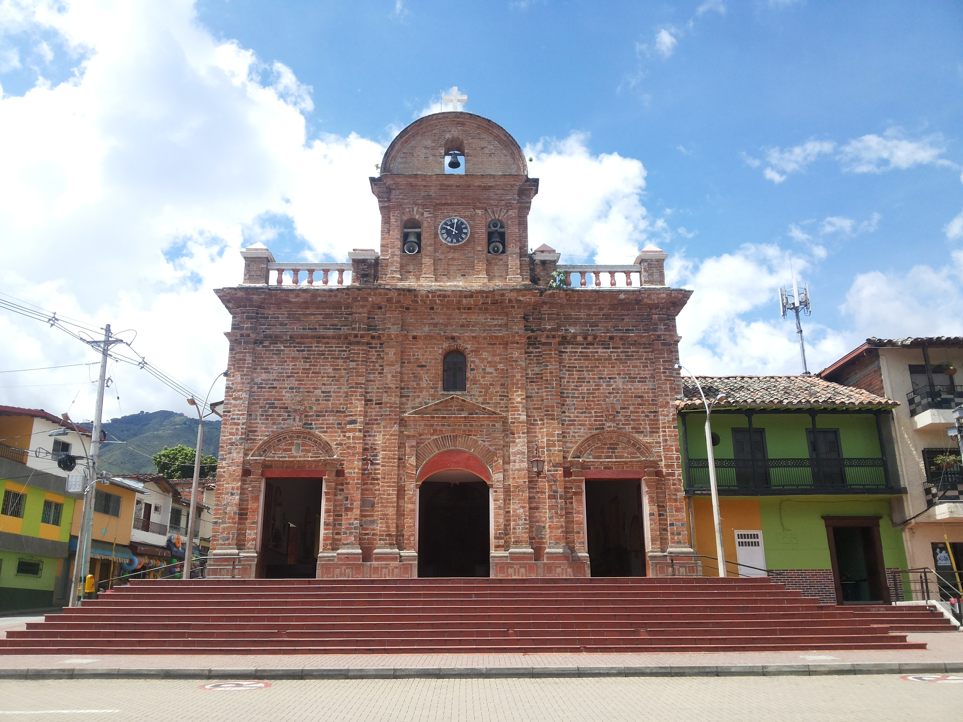 Fachada del templo principal del municipio de San Jerónimo. Antioquia, Colombia.